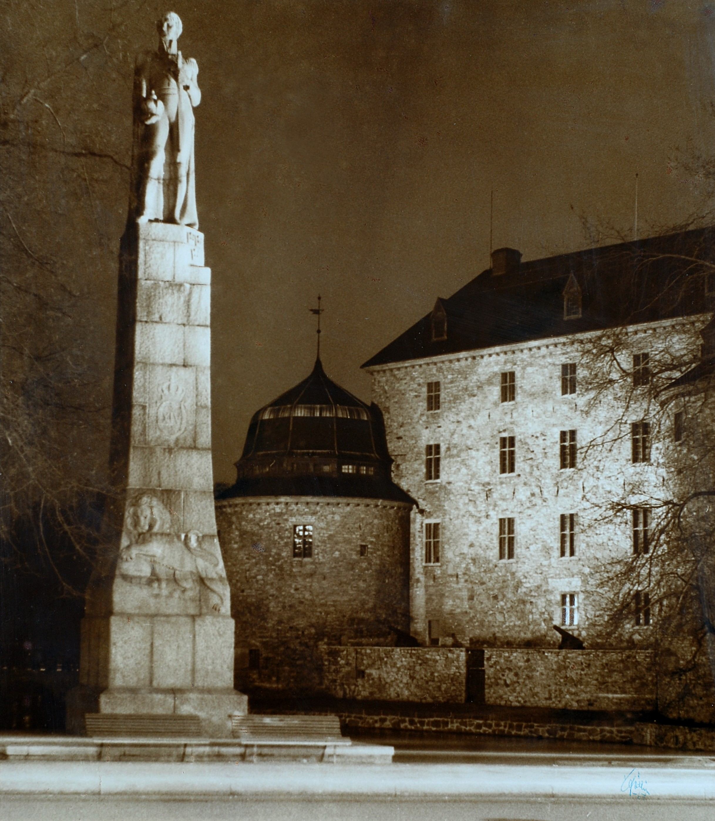 Karl Johan och Örebro Slott (Sepia fotografi)